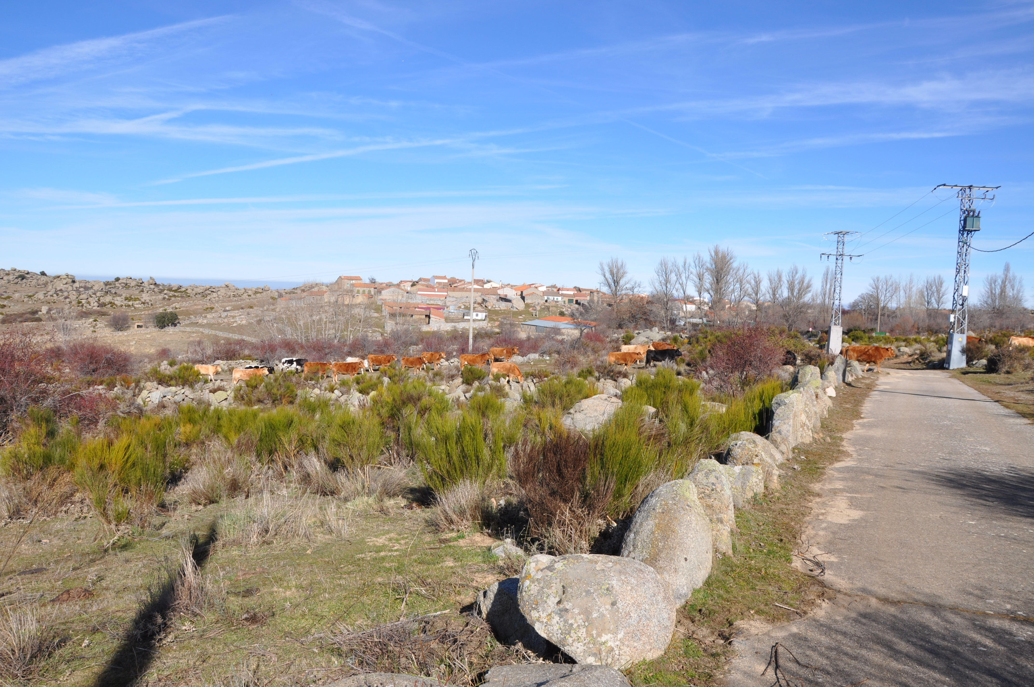 Panorama de Gallegos de Altamiros, Ávila, España